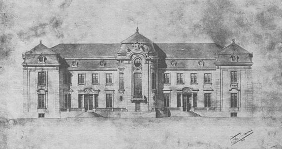 Беларуская (тарашкевіца): Жалудок (Žałudok), палац Сьвятаполк-Чацьвярцінскіх (Śviatapołk-Čaćviarcinski)